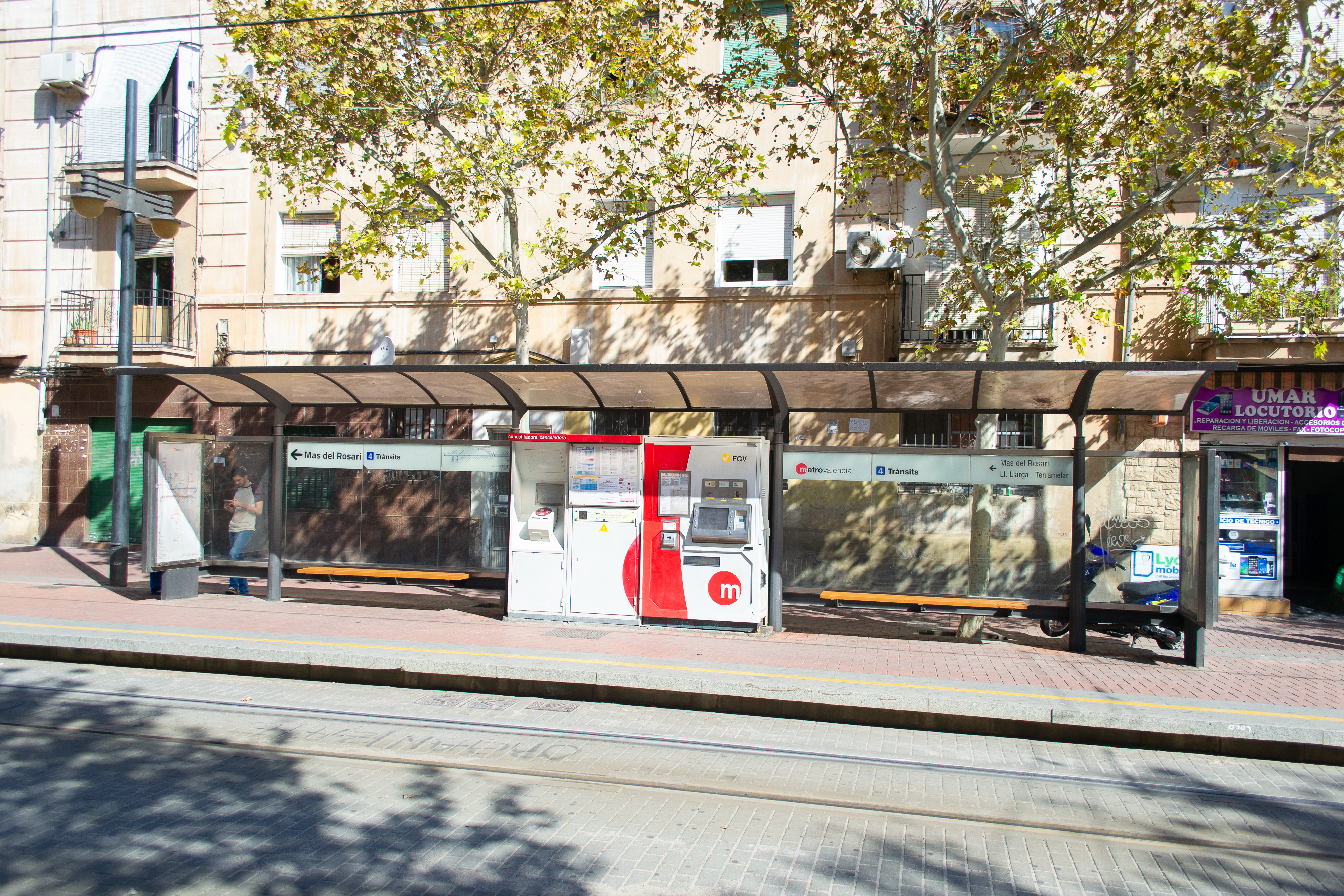 Estación de Trànsits de la línea 4 del tranvía de Valencia. La estación está en la calle del Mondúver 39.